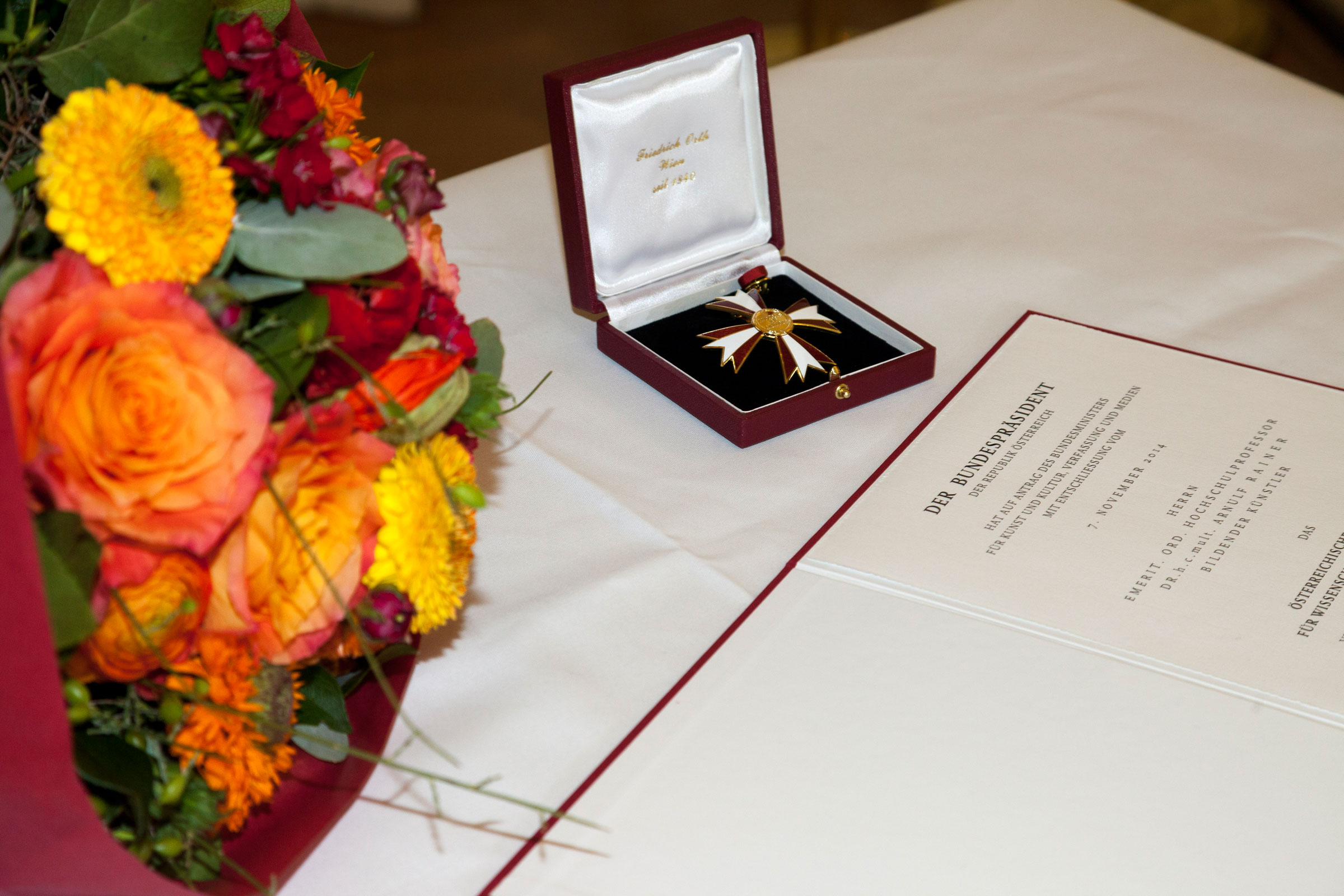 EK-Wisenschaft+Kunst-7791 Ehrenkreuz für Wissenschaft und Kunst I. Klasse mit Verleihungsurkunde für Arnulf Rainer.